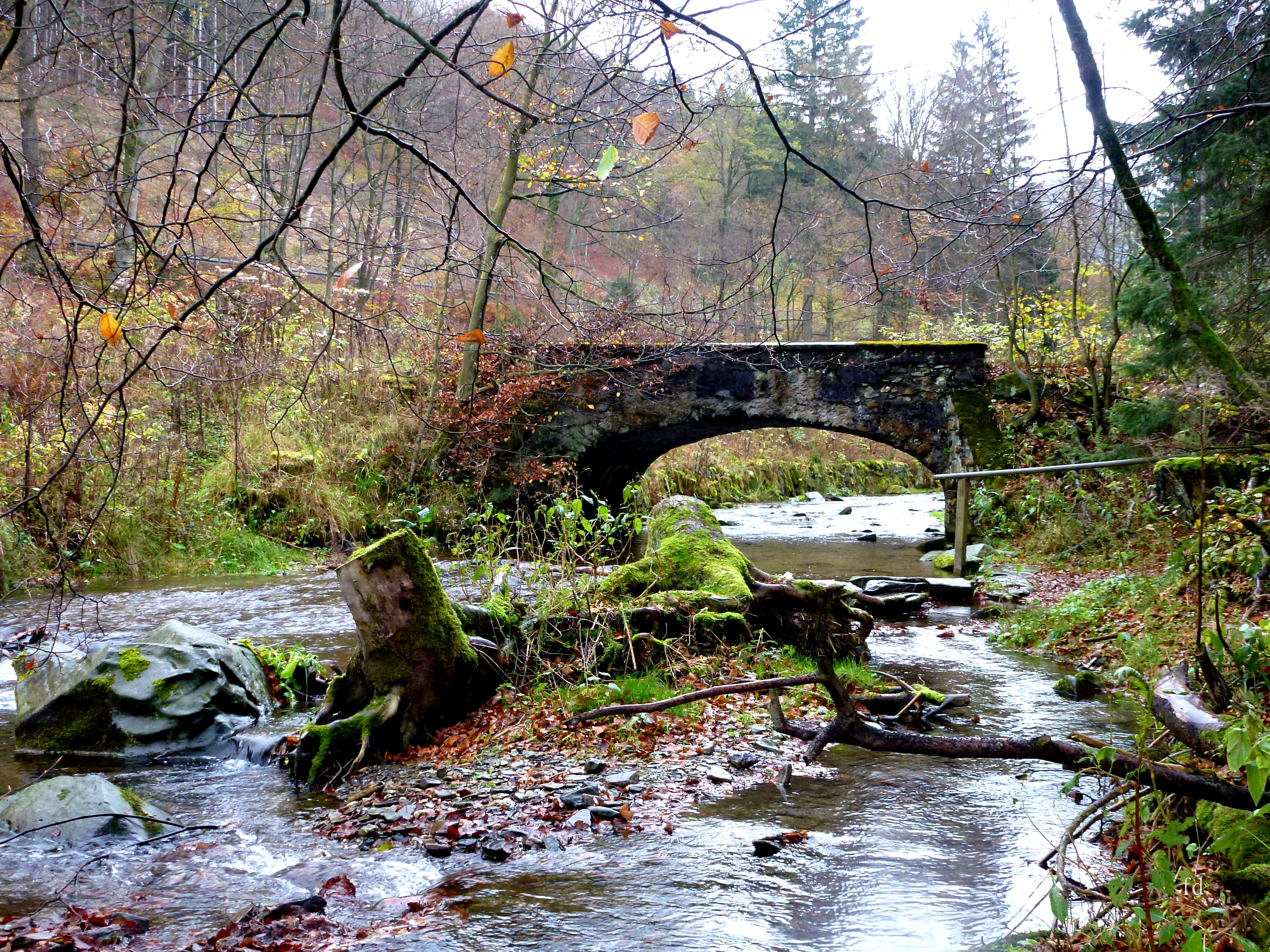 Alte Elpebrücke ca. 800 m südlich von Gevelinghausen, Naturschutzgebiet „Elpetal bei Gevelinghausen“ (HSK-276)